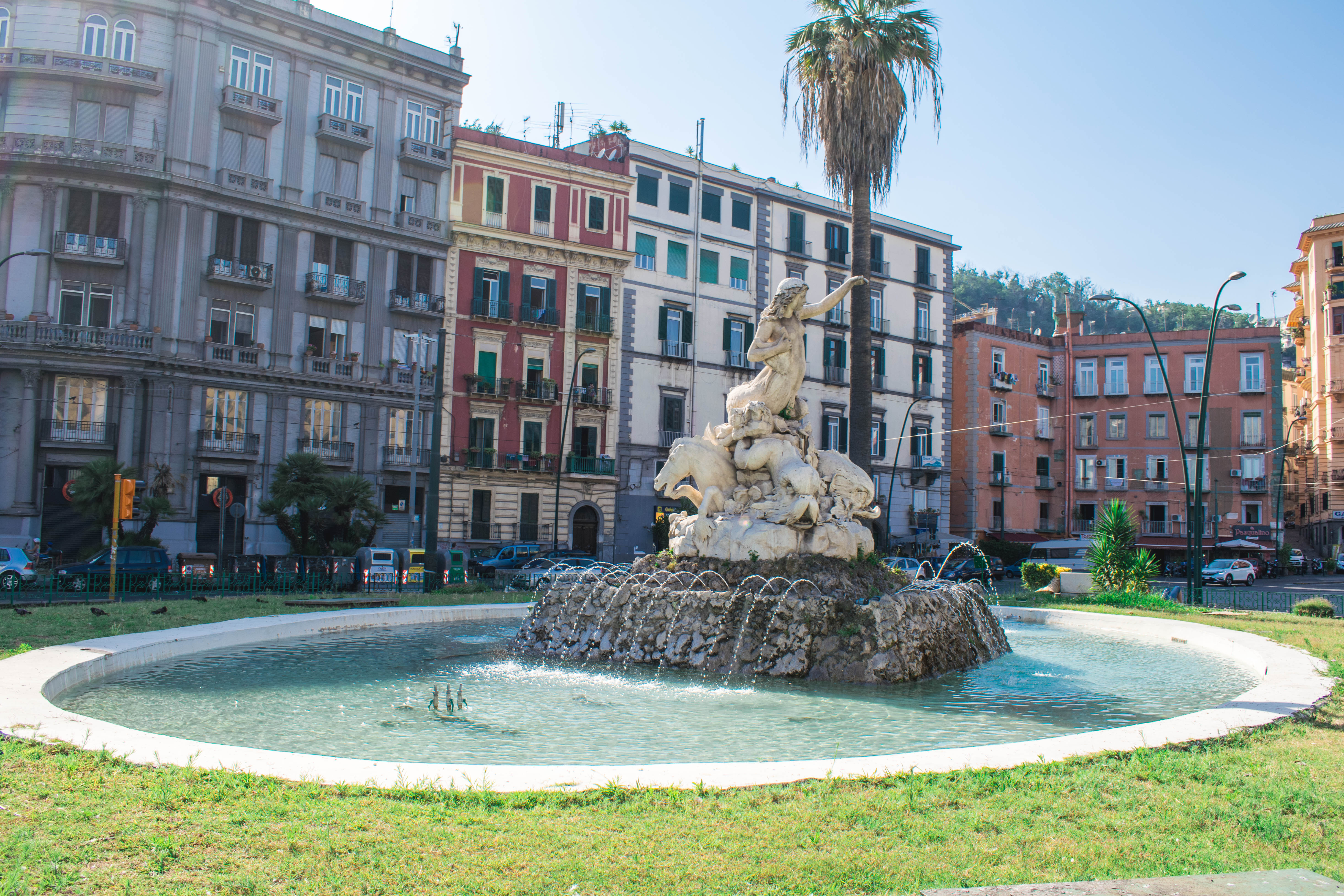 Fontana della Sirena